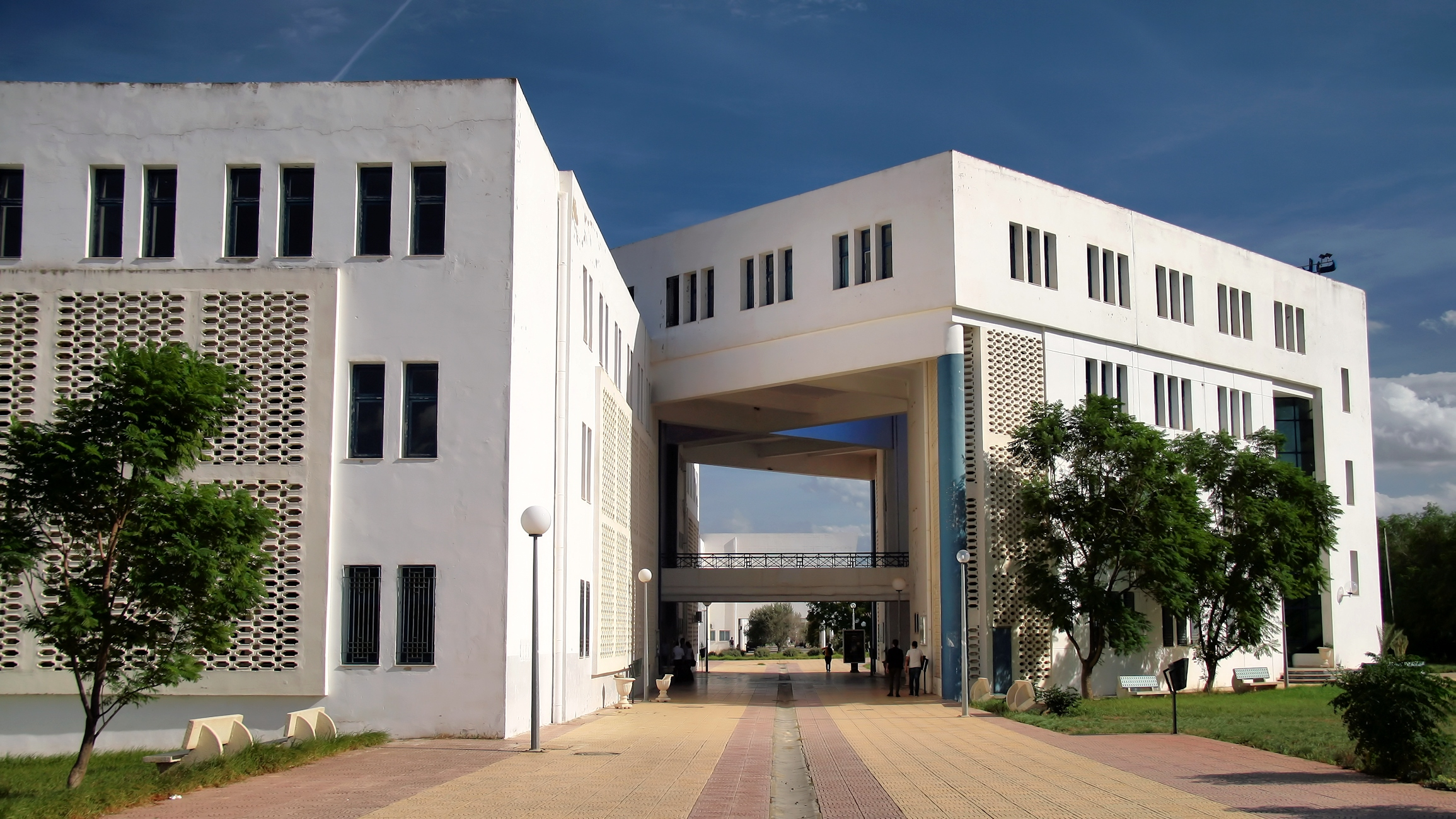 Campus universitaire de la Manouba